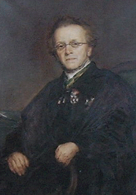 François Laurent (1810-1887), Belgian jurist and historian